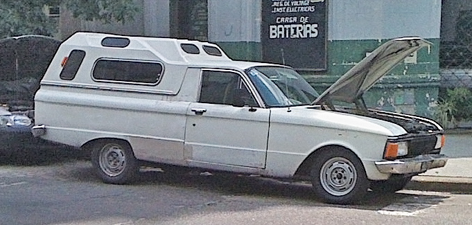 Ford Falcon Ranchero Аргентина